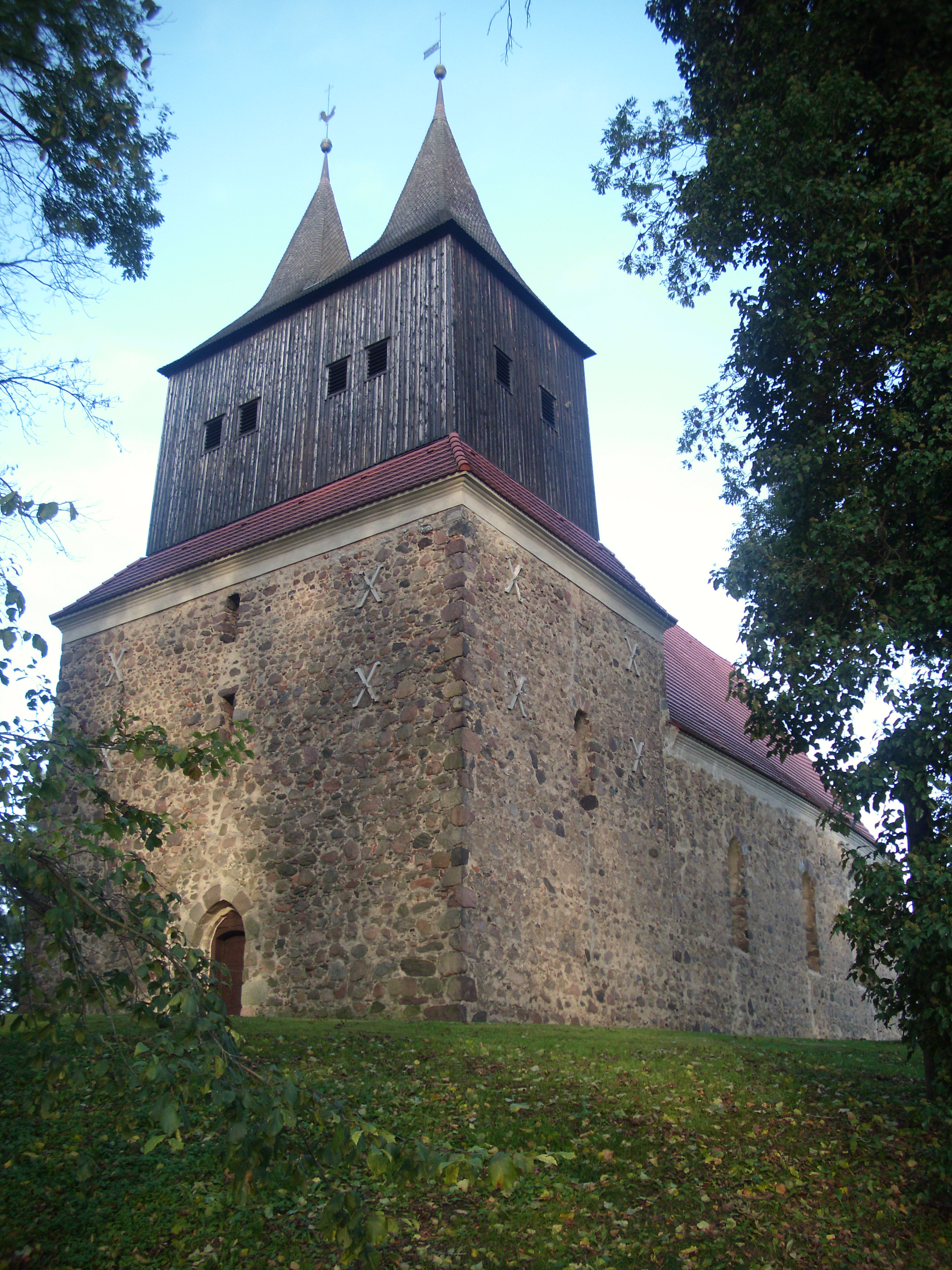 Kirche, Möbiskruge, Naturpark Schlaubetal, Brandenburg